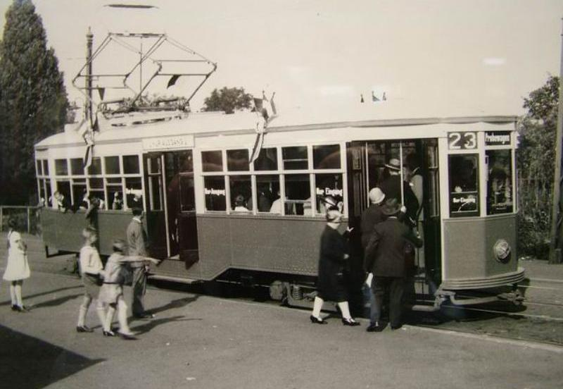 Vettura tranviaria serie 1500 dell'ATM di Milano, in prova sulla rete di Francoforte sul Meno